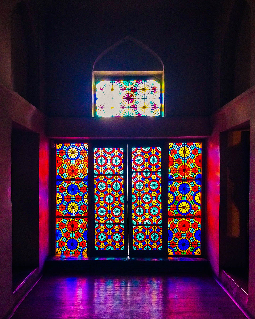 Şəki xan sarayında şəbəkə pəncərəli dəhliz